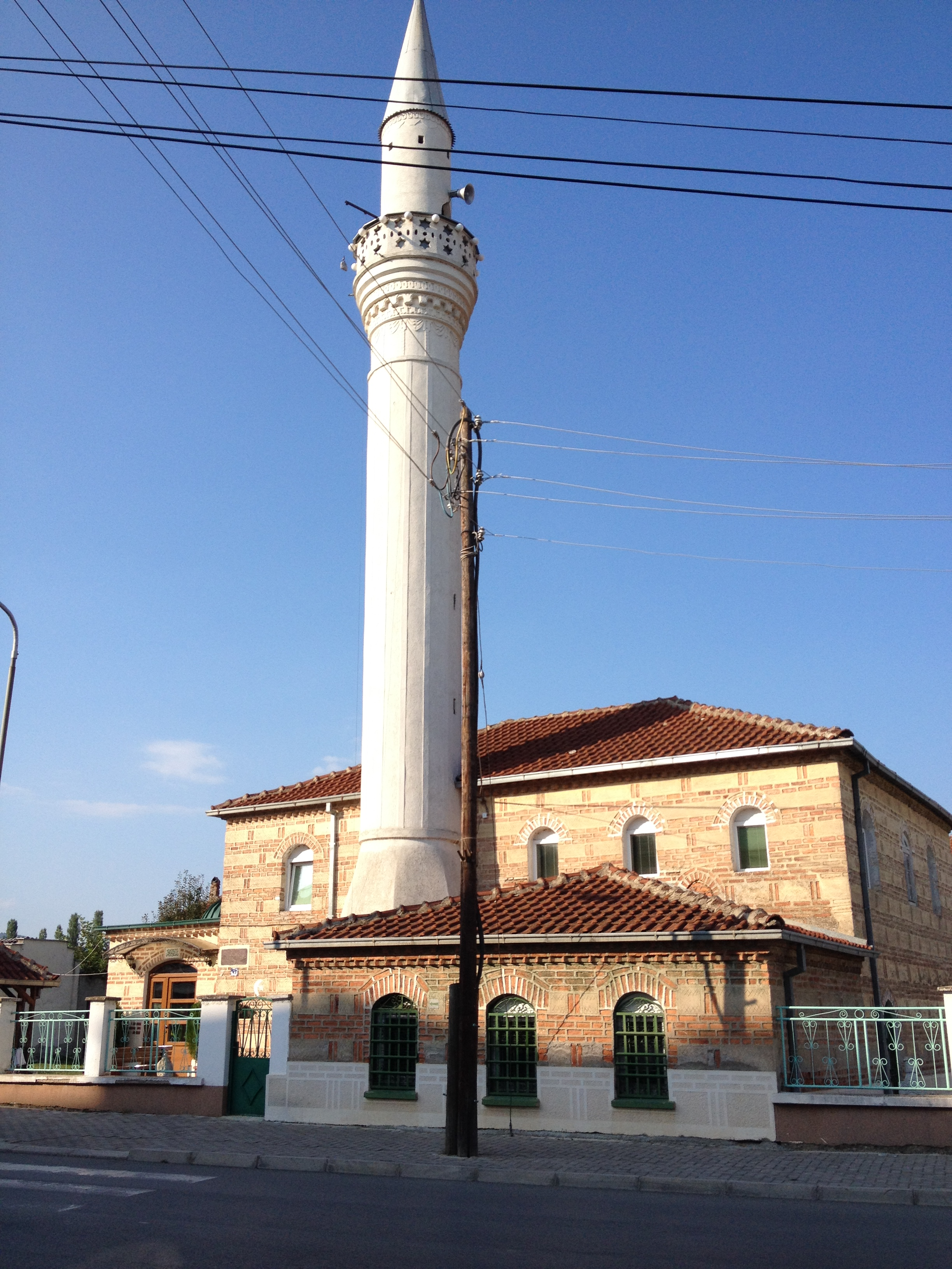 Die Haydar-Pascha-Moschee in Ohrid, Mazedonien